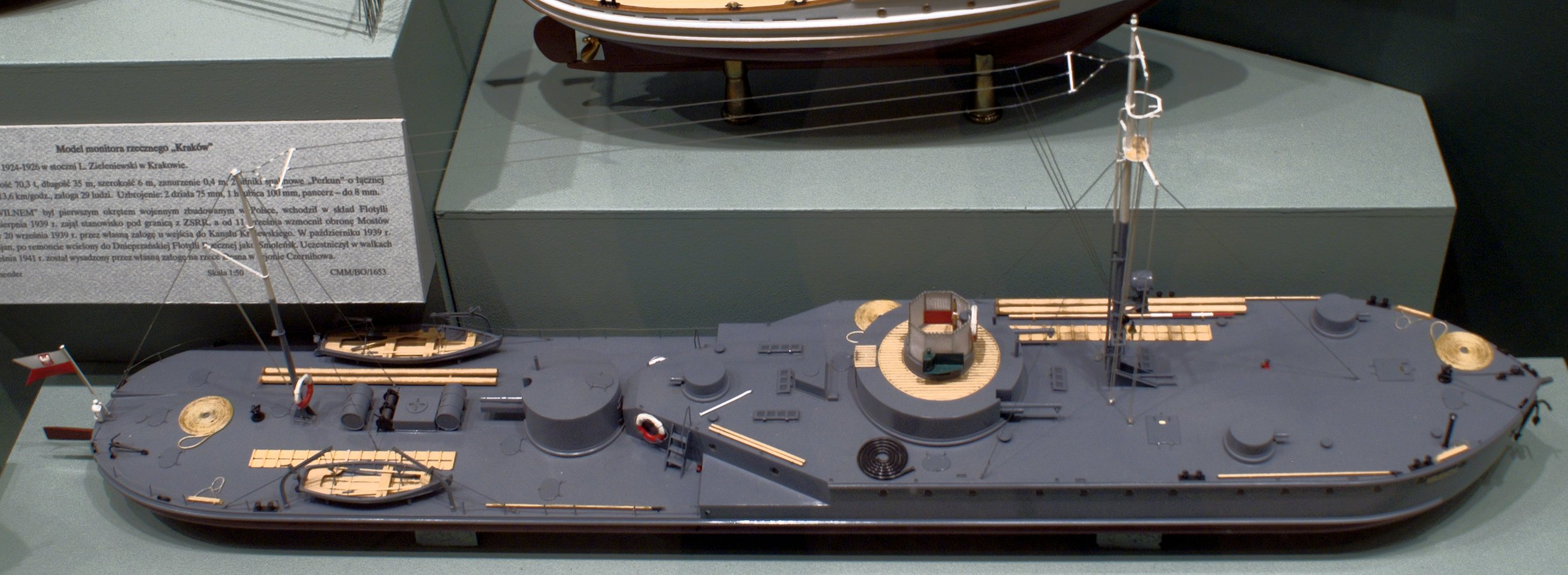 Model monitora rzecznego ORP Kraków (1926) w skali 1:50, wykonany przez P. Komender